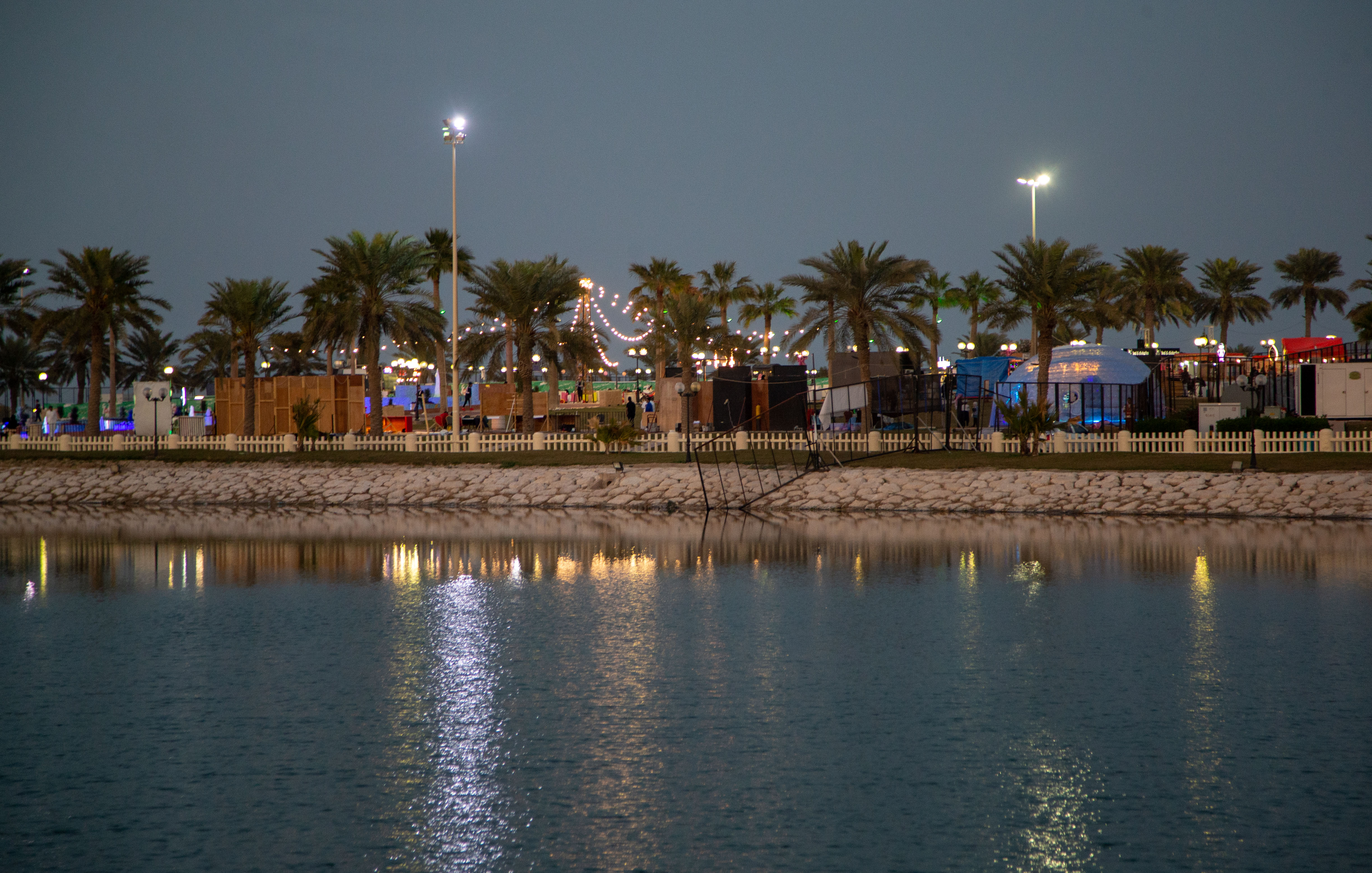 كورنيش مدينة الخبر المطلة على الخليج العربي